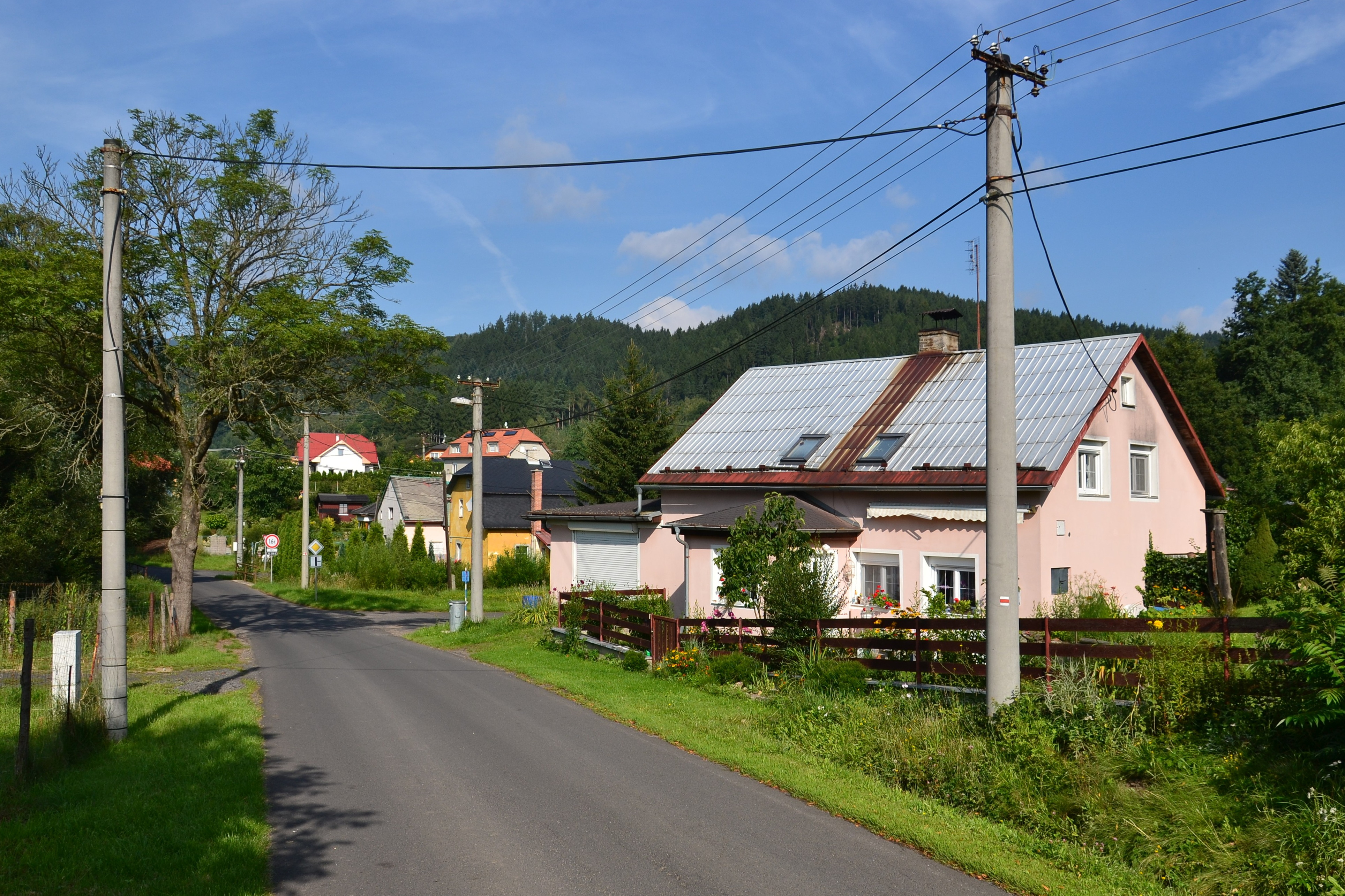 Jižní okraj vesnice